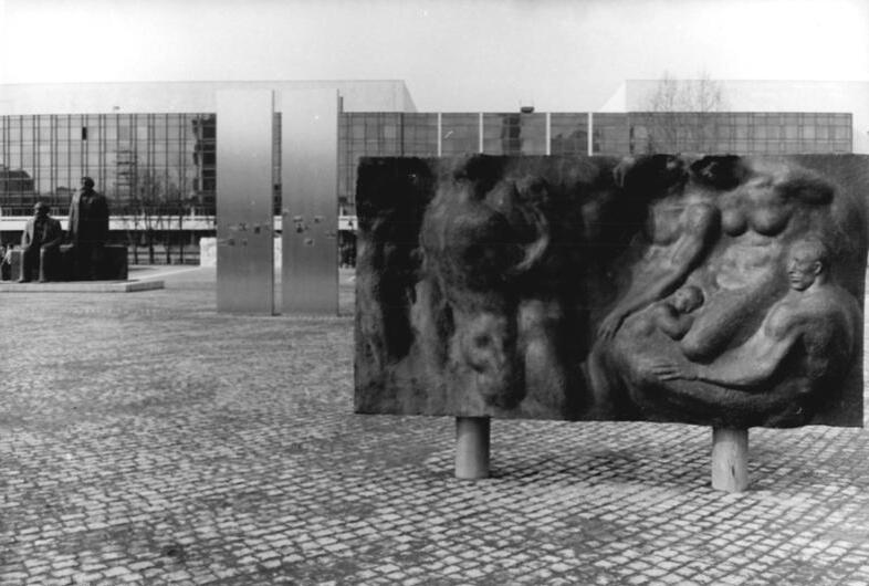 ADN-ZB-Link-3.4.86-Berlin: Arbeitsmaterial zum Marx-Engels-Forum.Die Gestaltung der repräsentativen Denkmalsanlage übernahm auch der Bildhauer Werner Stötzer mit einem Relief. Die Marmorarbeit ist 2.20m hoch und 10m lang. Sie zeigt eine Menschengruppe, deren Existenz von Ausbeutung und Unterdrückung geprägt wird.